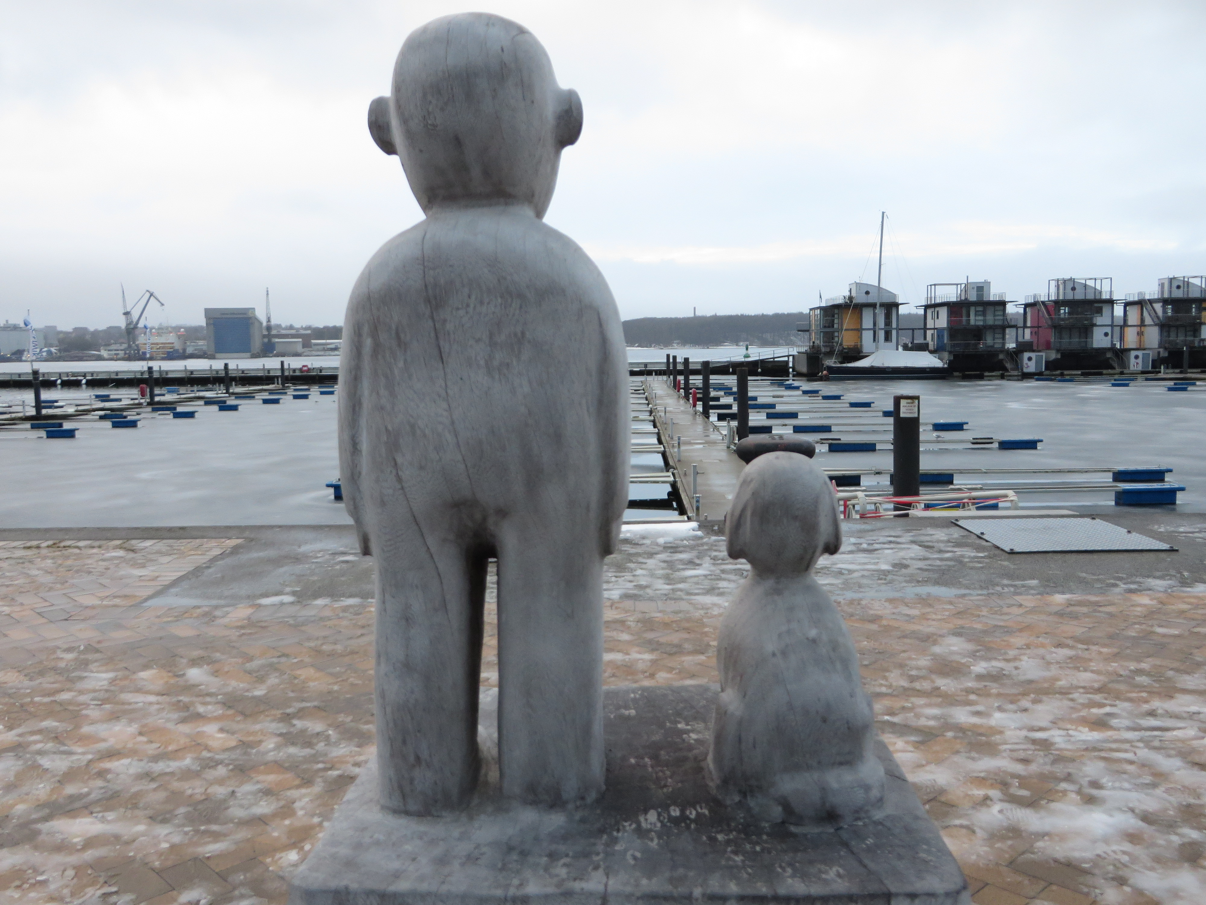 Skulpturenpaar aus Hund und Mann in Sonwik (Flensburg-Mürwik Januar 2015), Bild 06